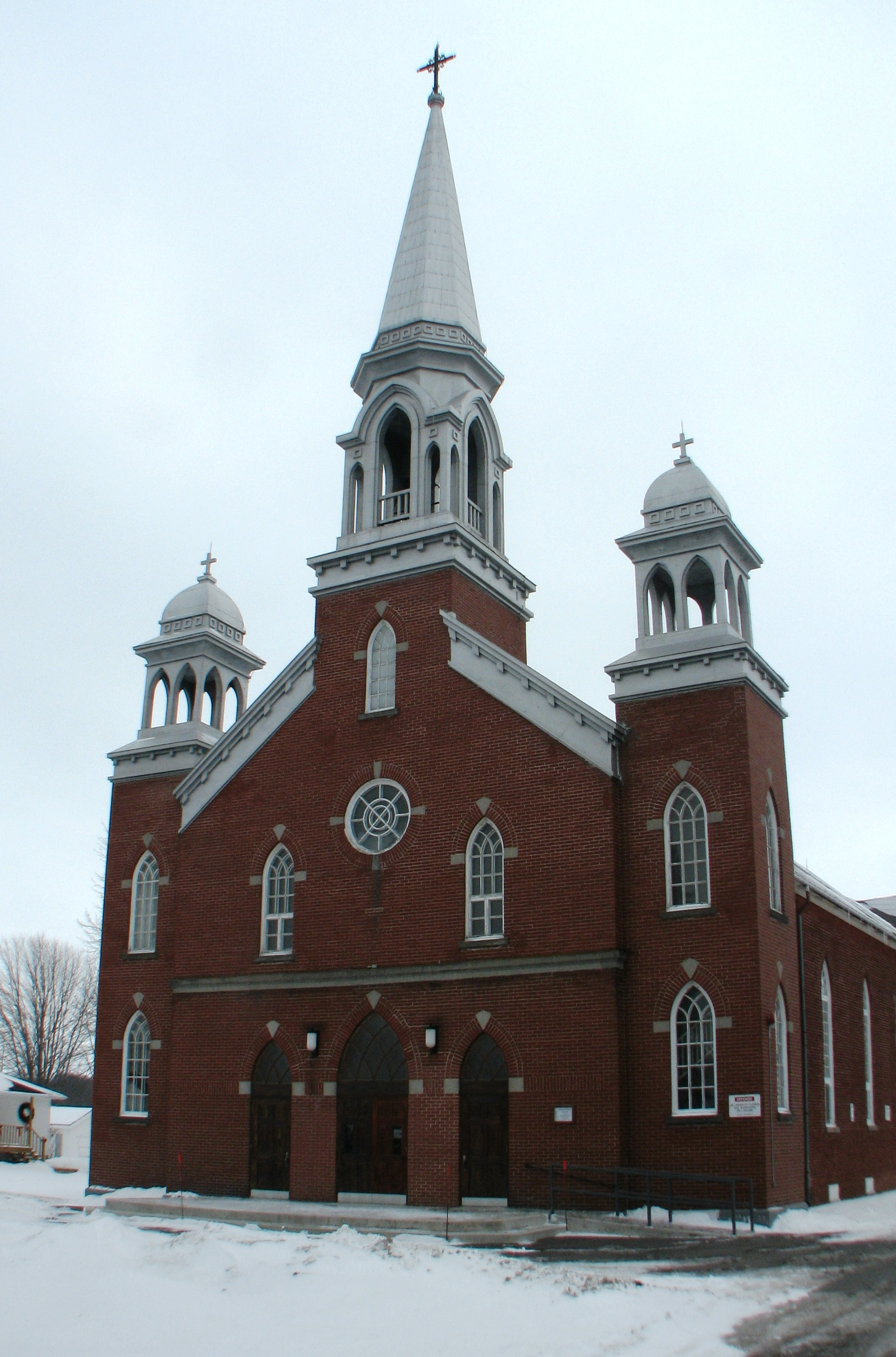 Église Sainte-Victoire de Sainte-Victoire-de-Sorel